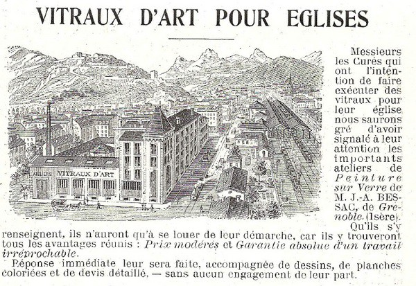 Encart publicitaire dans la Revue des Arts des Ateliers Bessac. Une illustration montre en perspective les ateliers de vitraux d'art à gauche de la gare de Grenoble. Au premier plan la façade nord, avec les verrières de l'atelier. Le panorama des montagnes est géographiquement assez fantaisiste : le fort de la Bastille, situé au nord-est, ne devrait pas être visible. Le texte à droite et sous l'illustration s'adresse à « Messieurs les Curés qui ont l'intention de faire exécuter des vitraux pour leur église ».